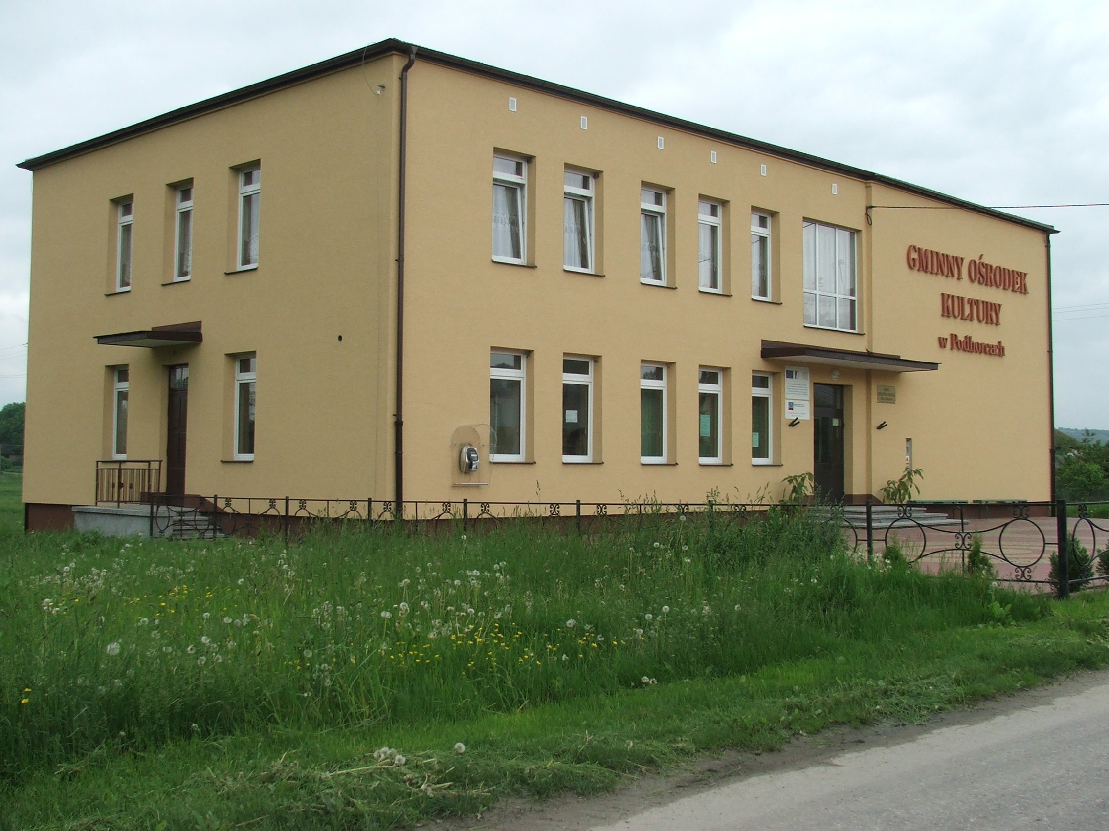 Podhorce: Gminny Ośrodek Kultury